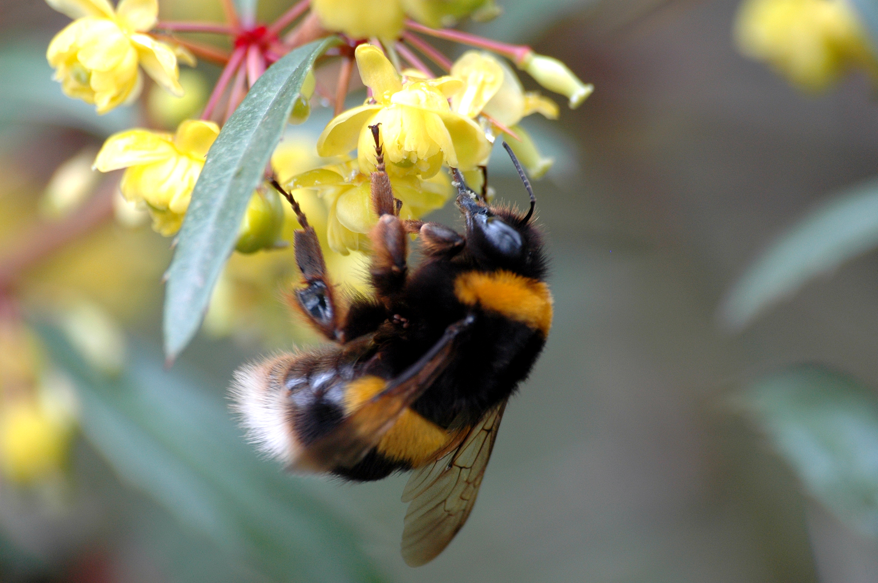 Abril, 2005